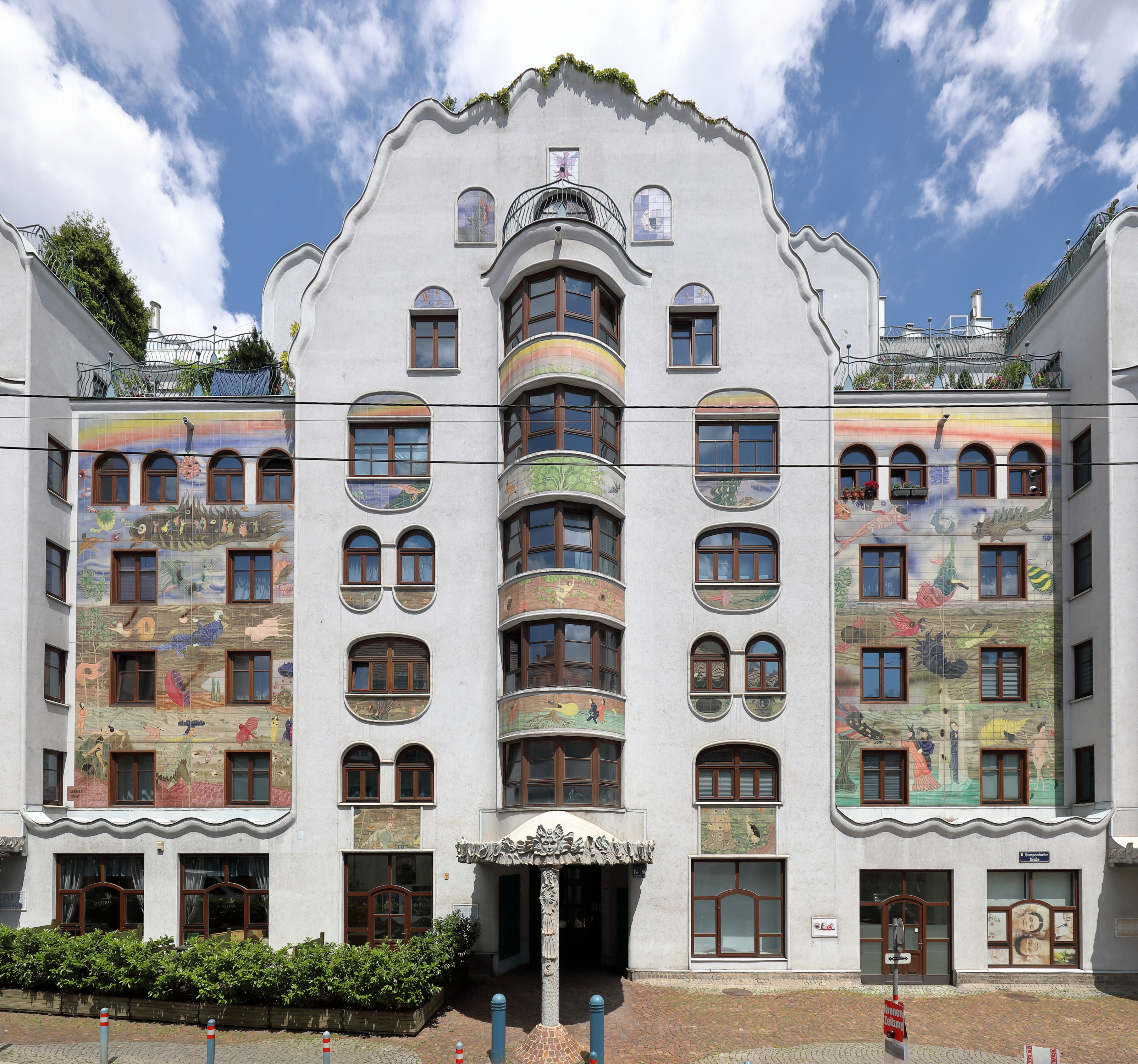 Das Arik-Brauer-Haus an der Adresse Gumpendorfer Straße 134-136 im 6. Wiener Gemeindebezirk Mariahilf.Das fünfstöckige Wohnhaus (33 Wohnungen, drei Geschäftslokale) wurde von dem Wiener Künstler Arik Brauer gestaltet - unter anderem mittels zwei großen Fliesenbildern an der Frontseite. Die Planung führte im Auftrag der MA 19 (Architektur und Stadtgestaltung) Peter Pelikan durch, der bereits mit Friedensreich Hundertwasser gearbeitet hatte. Das Modell wurde der Öffentlichkeit am 27. Jänner 1987 präsentiert, ab 1991 wurde das Haus errichtet und im April 1994 vom Bürgermeister Helmut Zilk eröffnet.